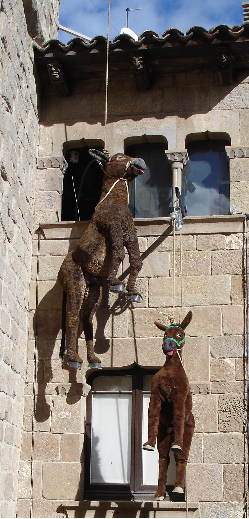 Rucs que es pengen al Campanar de les Hores de Solsona durant les Festes del Carnaval. El petit únicament hi resta penjat el dilluns (Carnaval infantil).